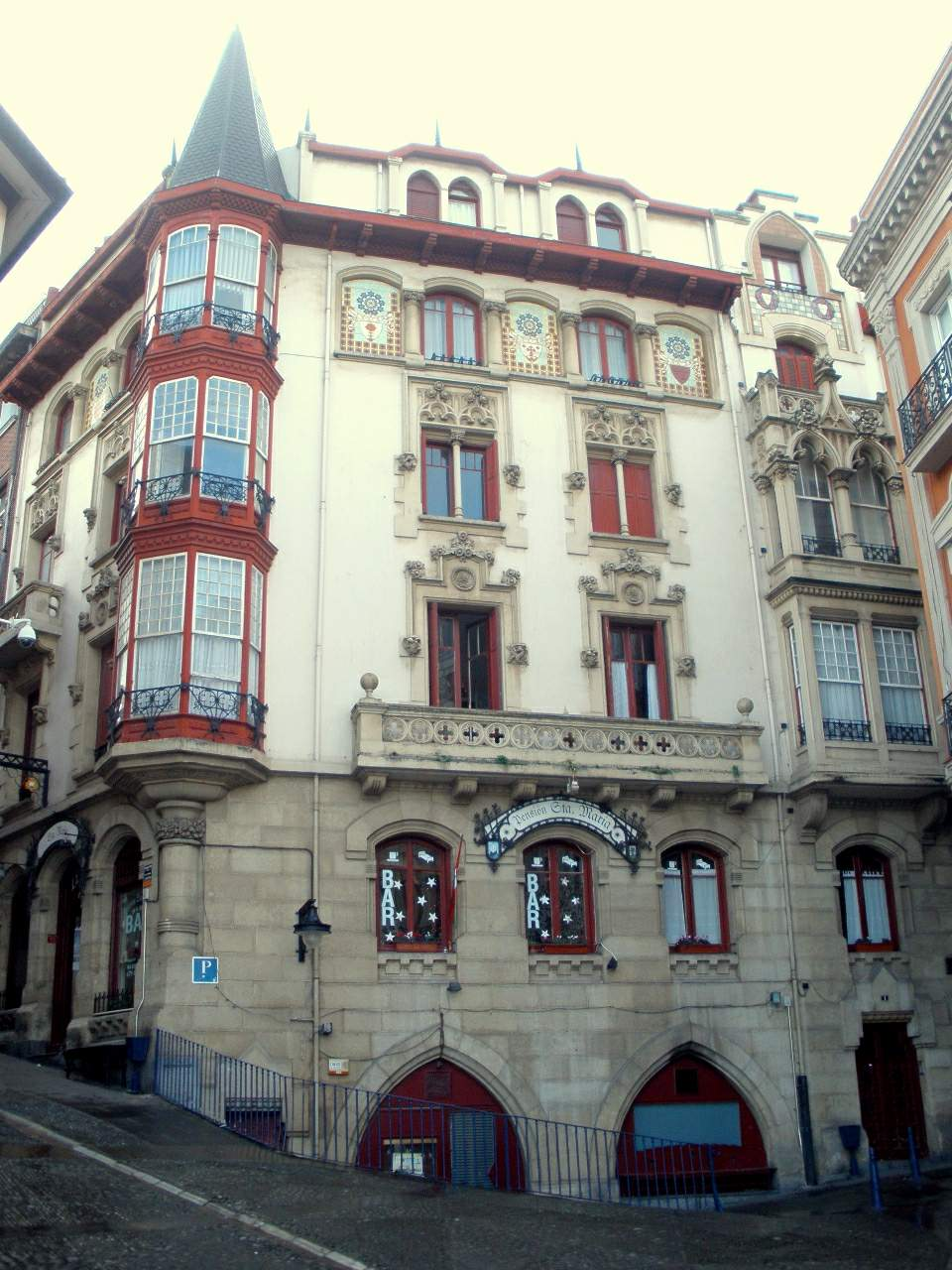 Casa de Elías López Bustamante (Portugalete, Bizkaia)